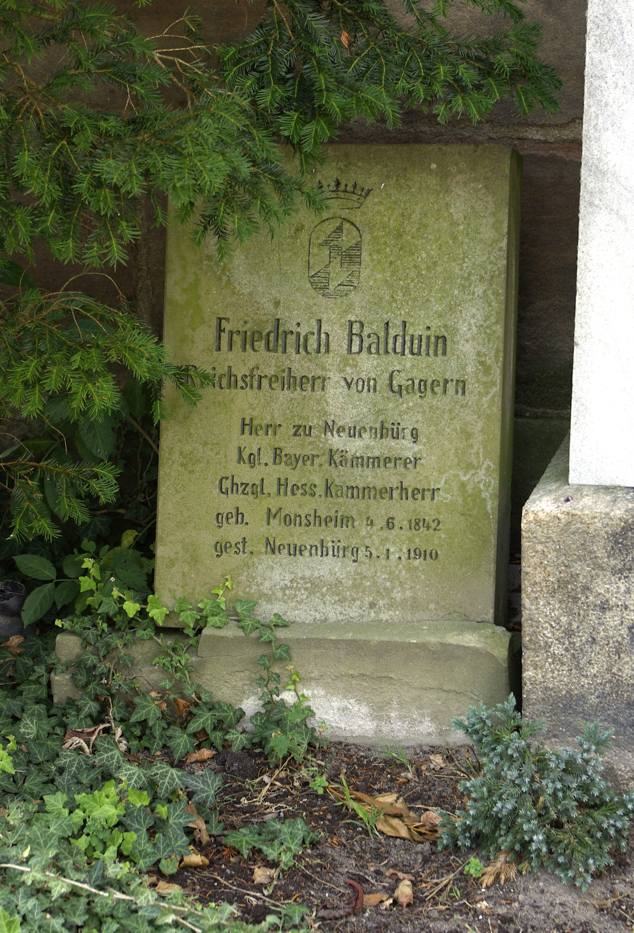 Familiengruft der Familie von Gagern bei der Kirchenburg der Pfarrkirche Geburt Mariens und Katharina in Hannberg (Heßdorf) im Landkreis Erlangen-Höchstadt.